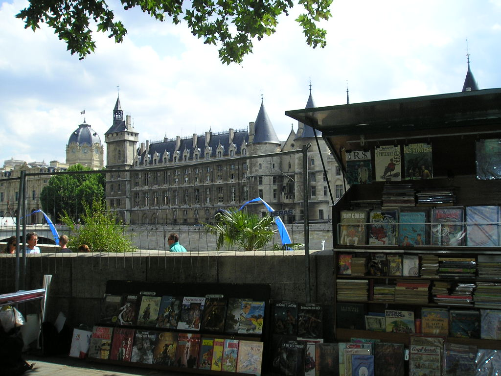 Conciergerie, la Seine